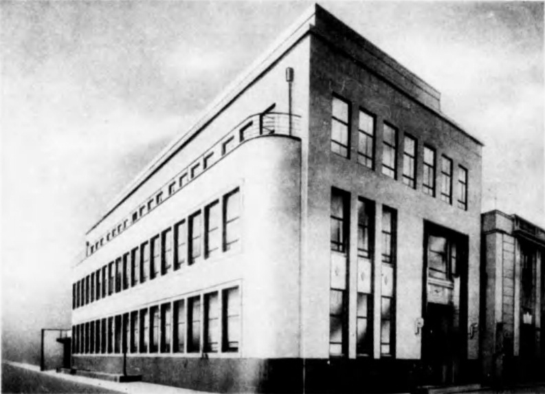 岸和田紡績寺田ビルヂング、1941年